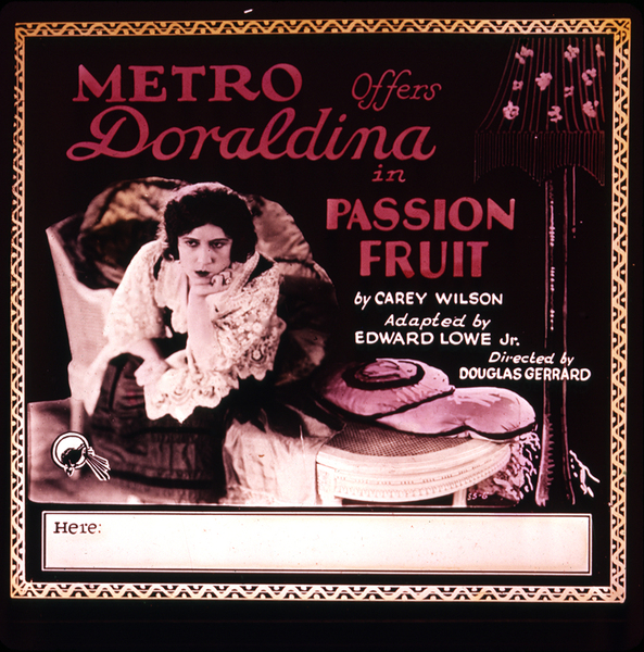 Passion Fruit lantern slide